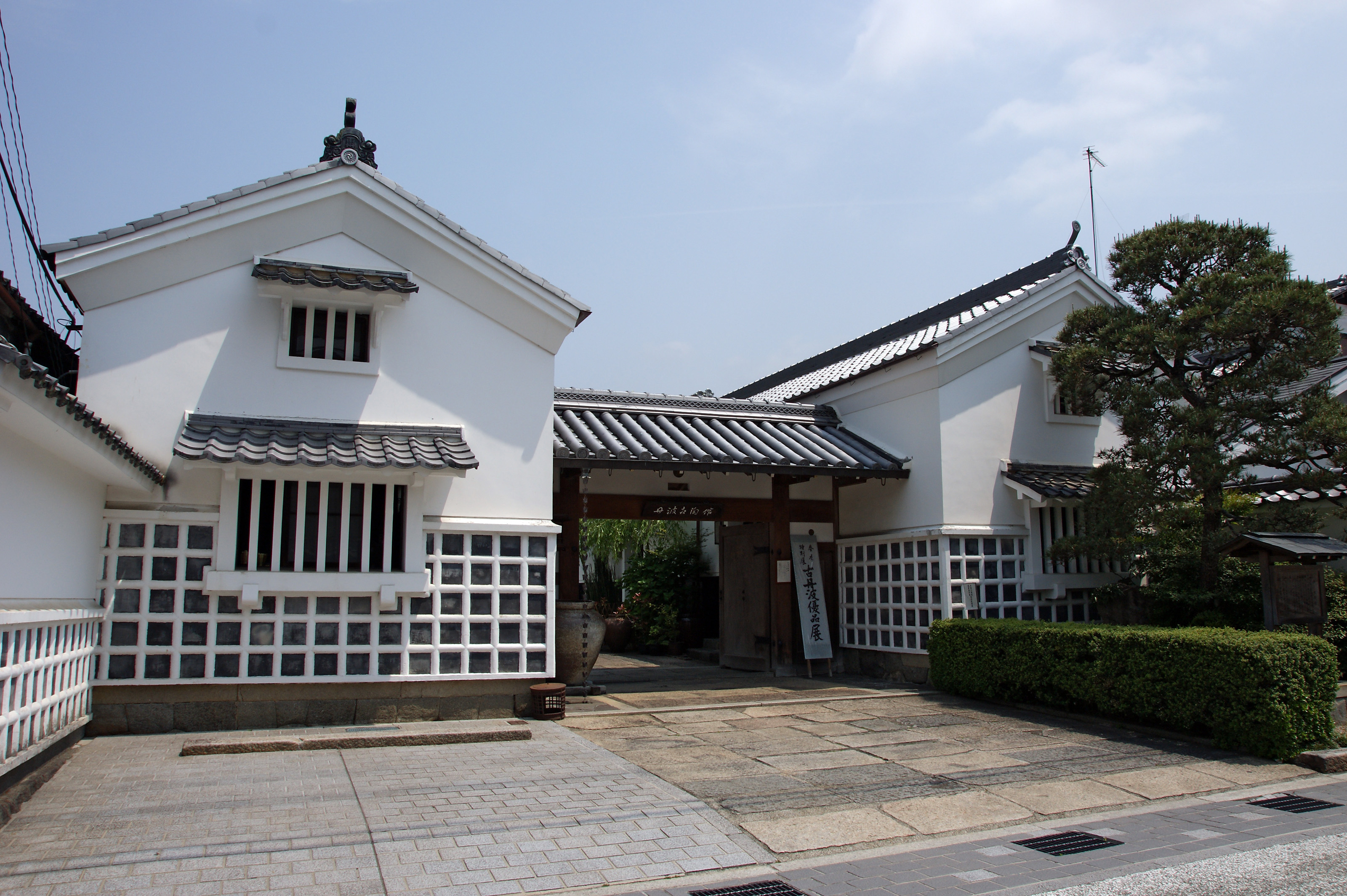 Tamba Pottery Museum in Kwara-machi, Sasayama, Hyogo prefecture, Japan